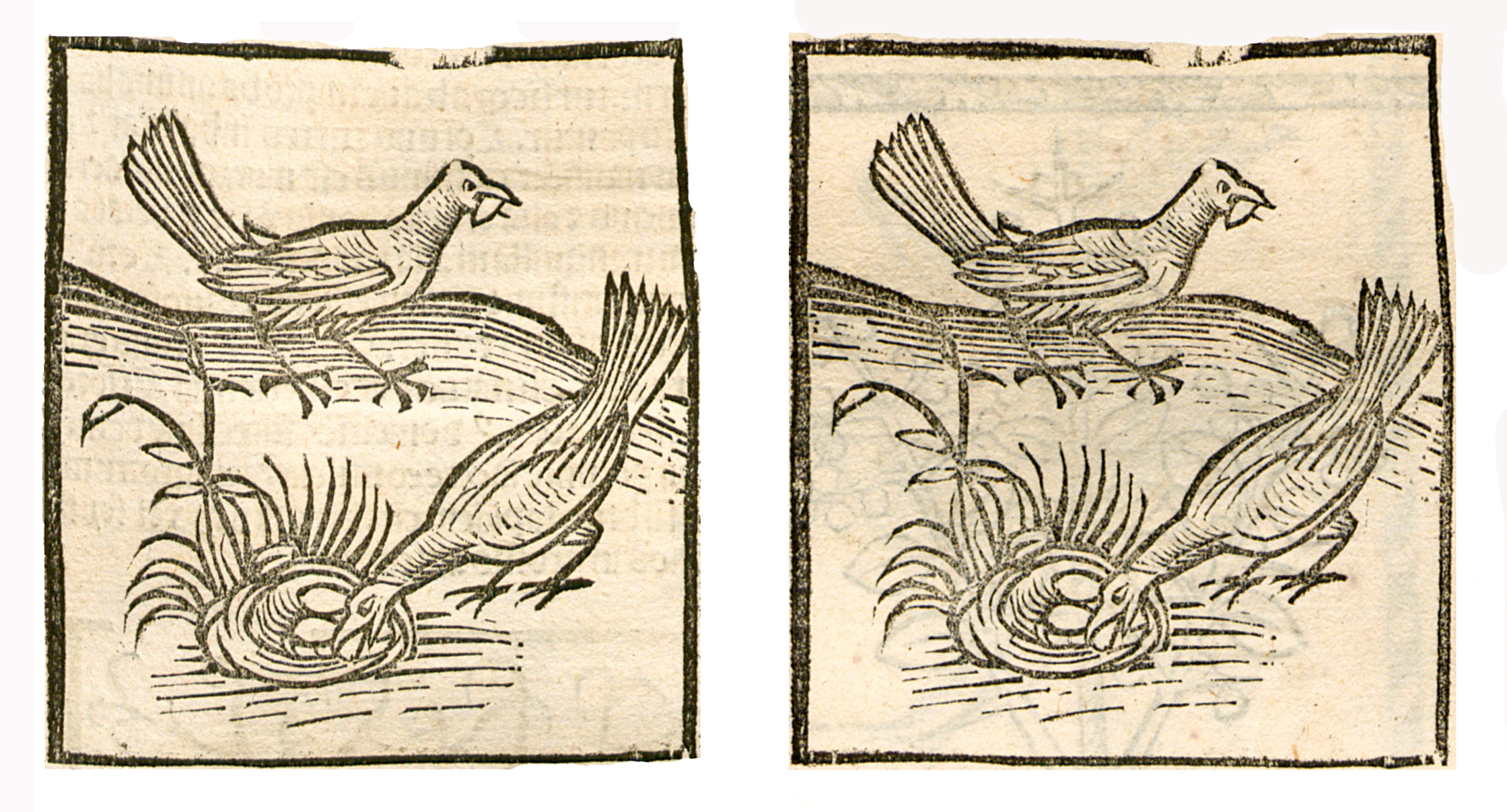 Abbildung von: Hennen (Gallina)